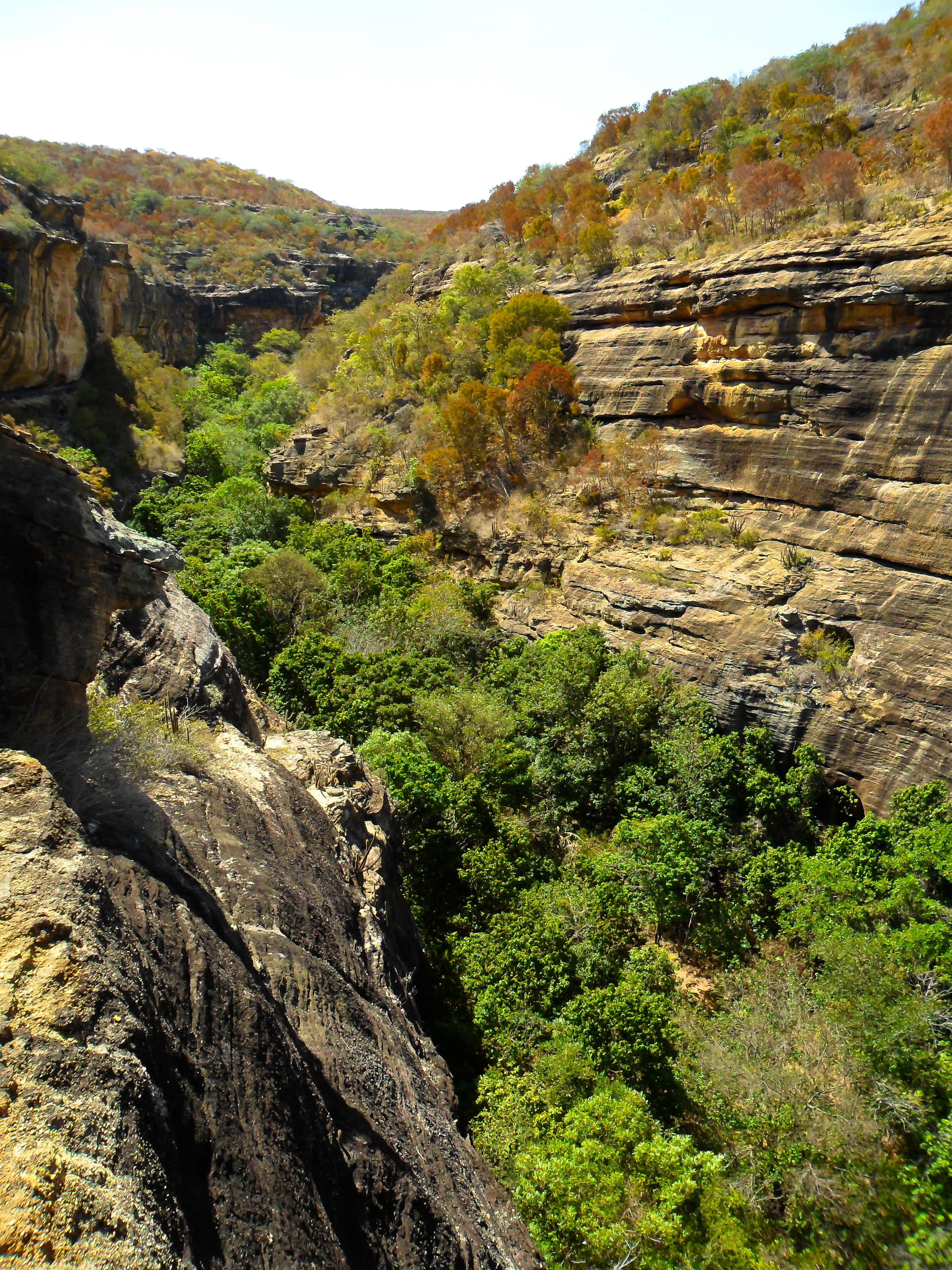 Vista Geral do sítio arqueológico Baixão da Vaca